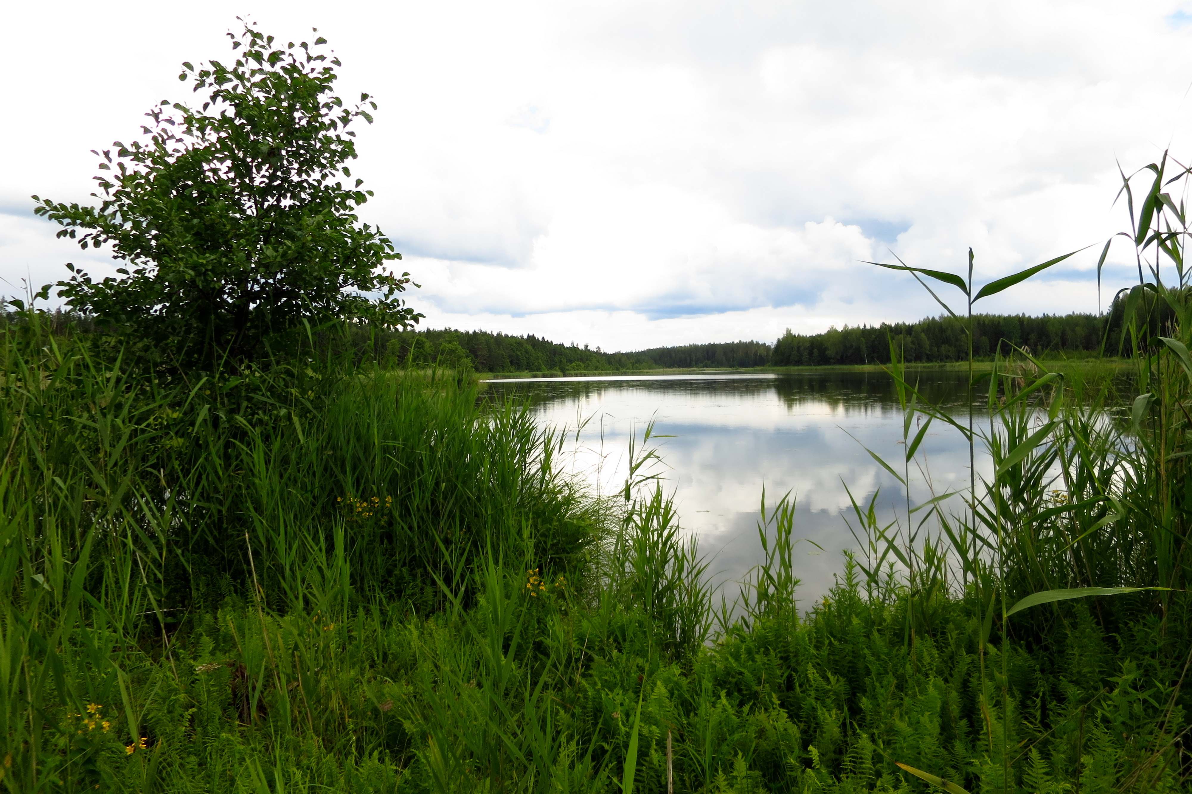 Mudsina järv